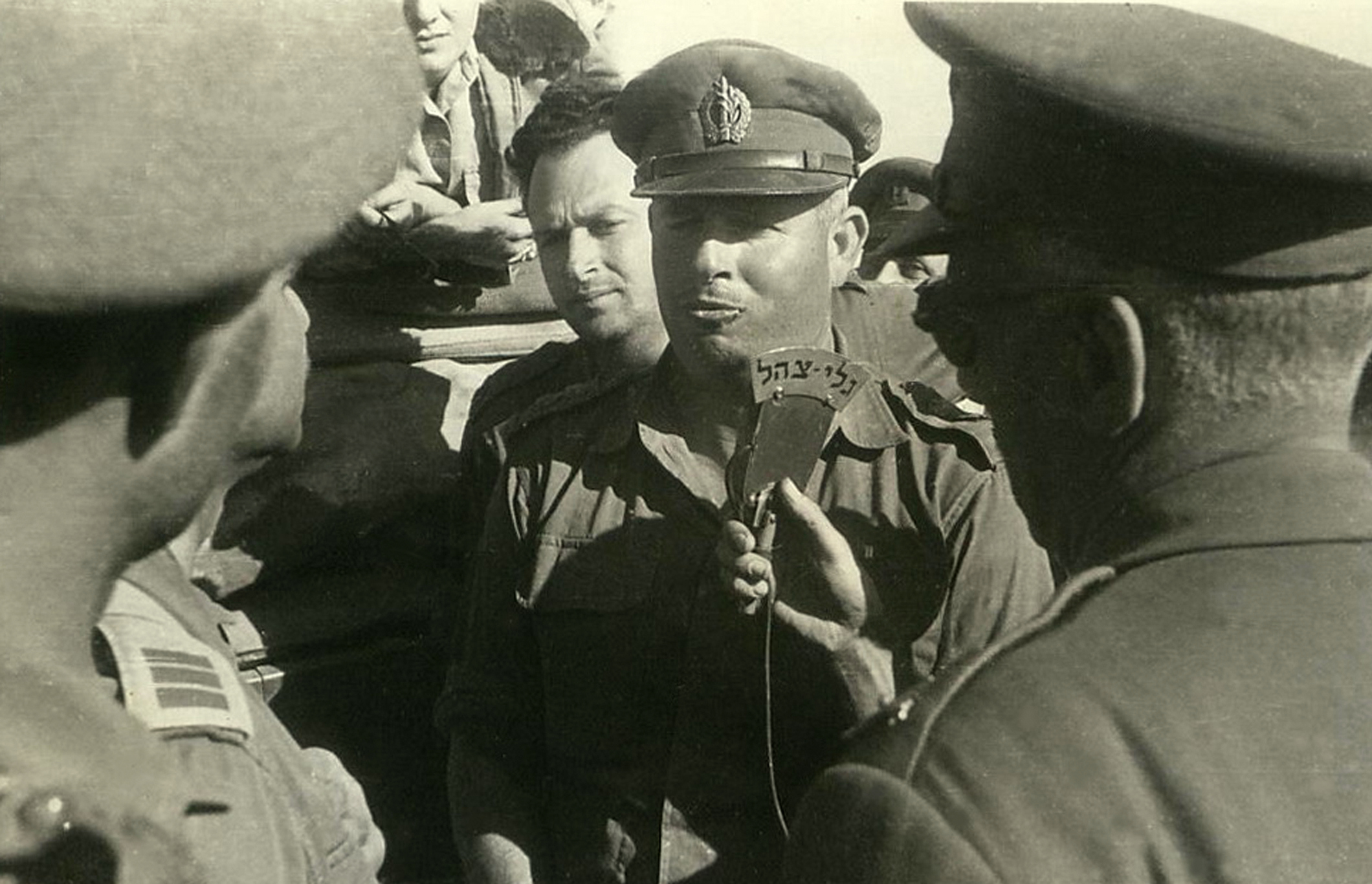 Asaf Simchoni interviews in IDF Radio after the Sinai War, 1956